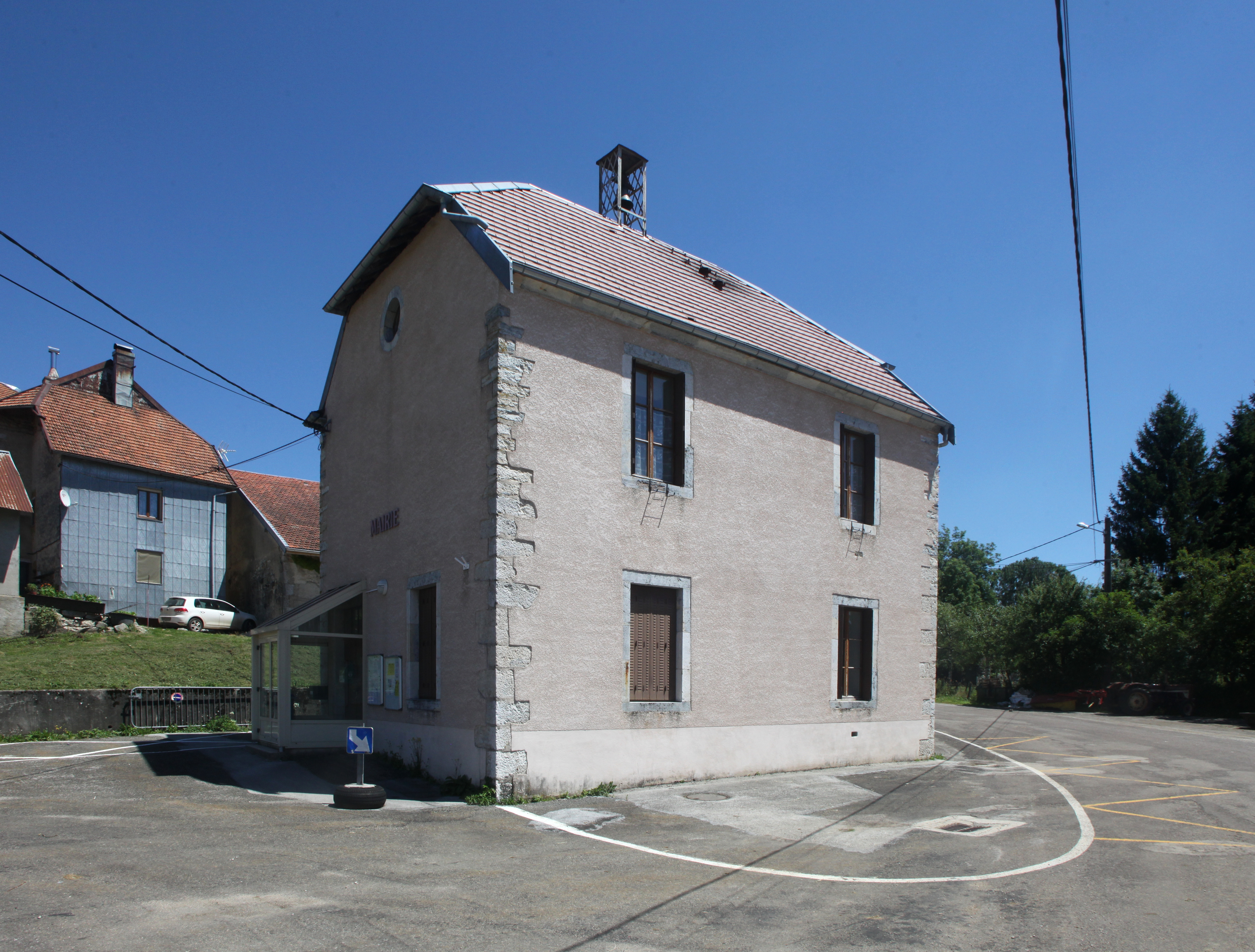 Mairie de La Favière (Jura).